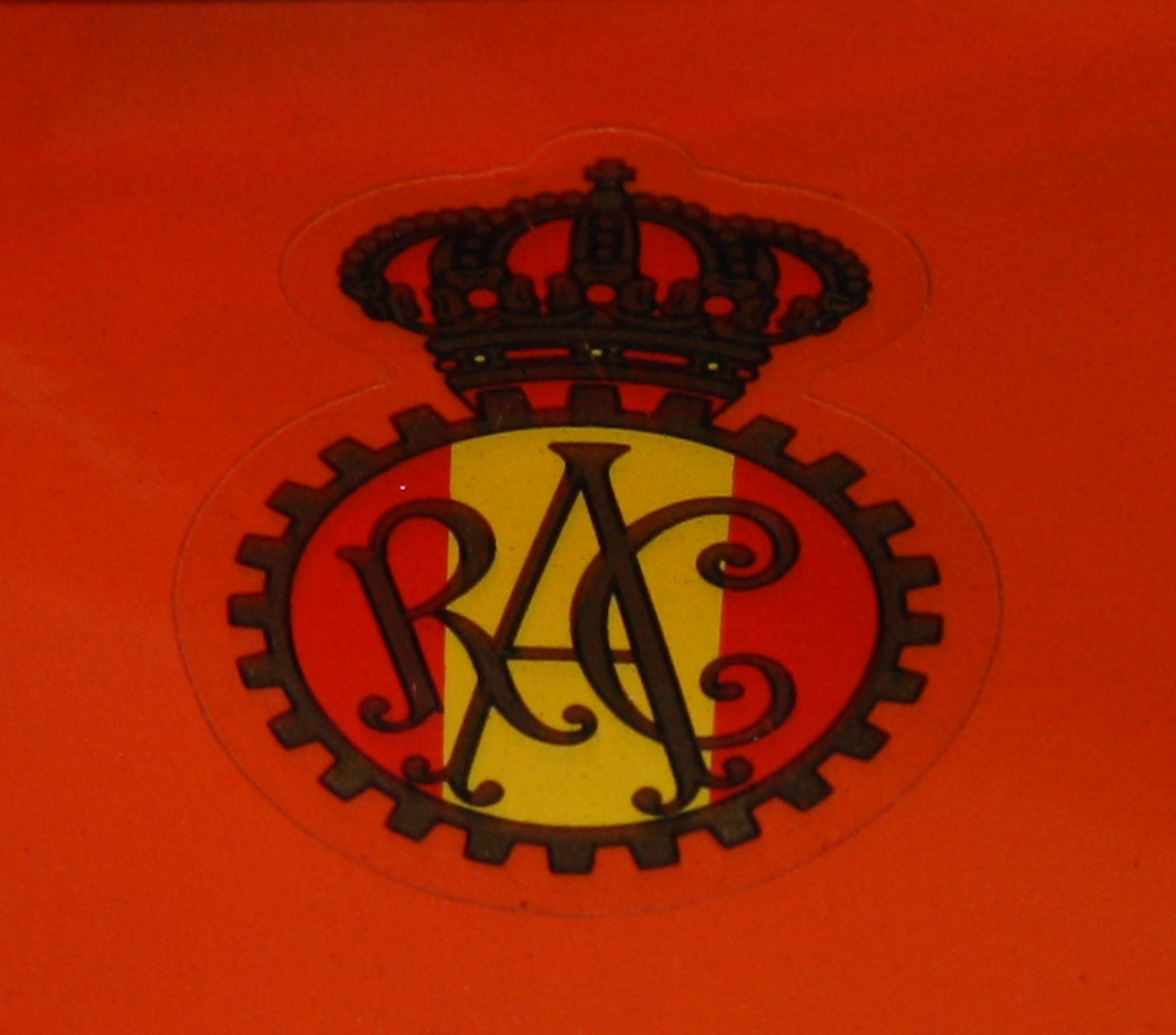 Logo antiguo RACE, Real Automovil Club de España